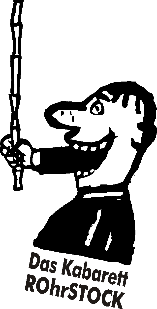 Logo Kabarett ROhrSTOCK